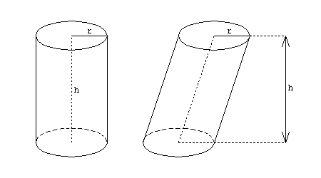 KreiszylinderVar